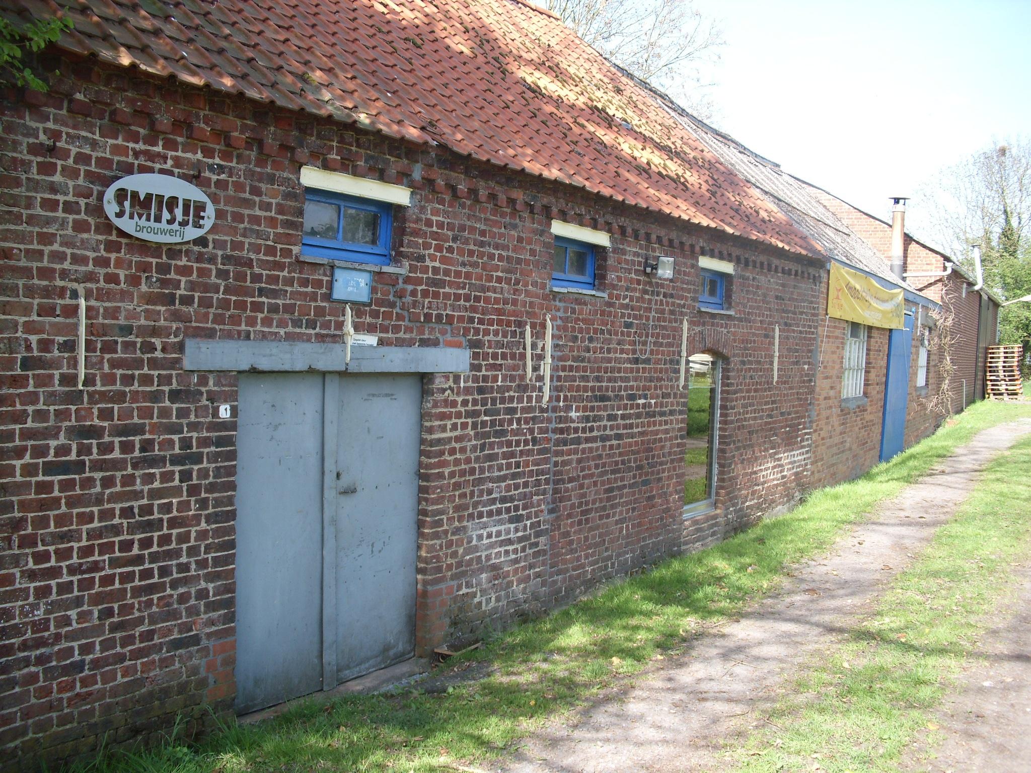 Brouwerij Smisje - Driesleutelstraat 1 - Mater - Oudenaarde - Oost-Vlaanderen - Vlaams Gewest - België